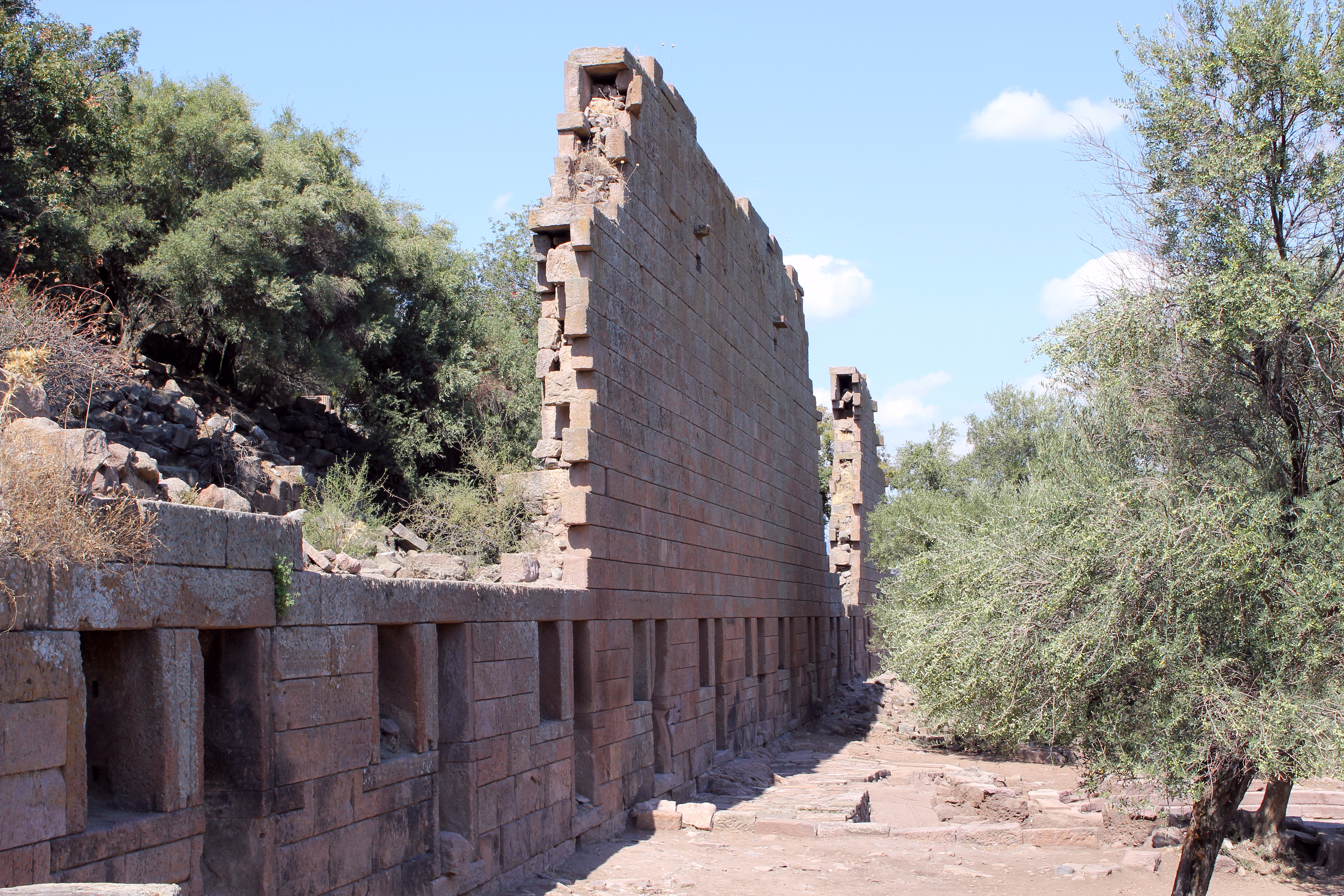 Fassade der Markthalle in Aigai (Äolis), Westtürkei